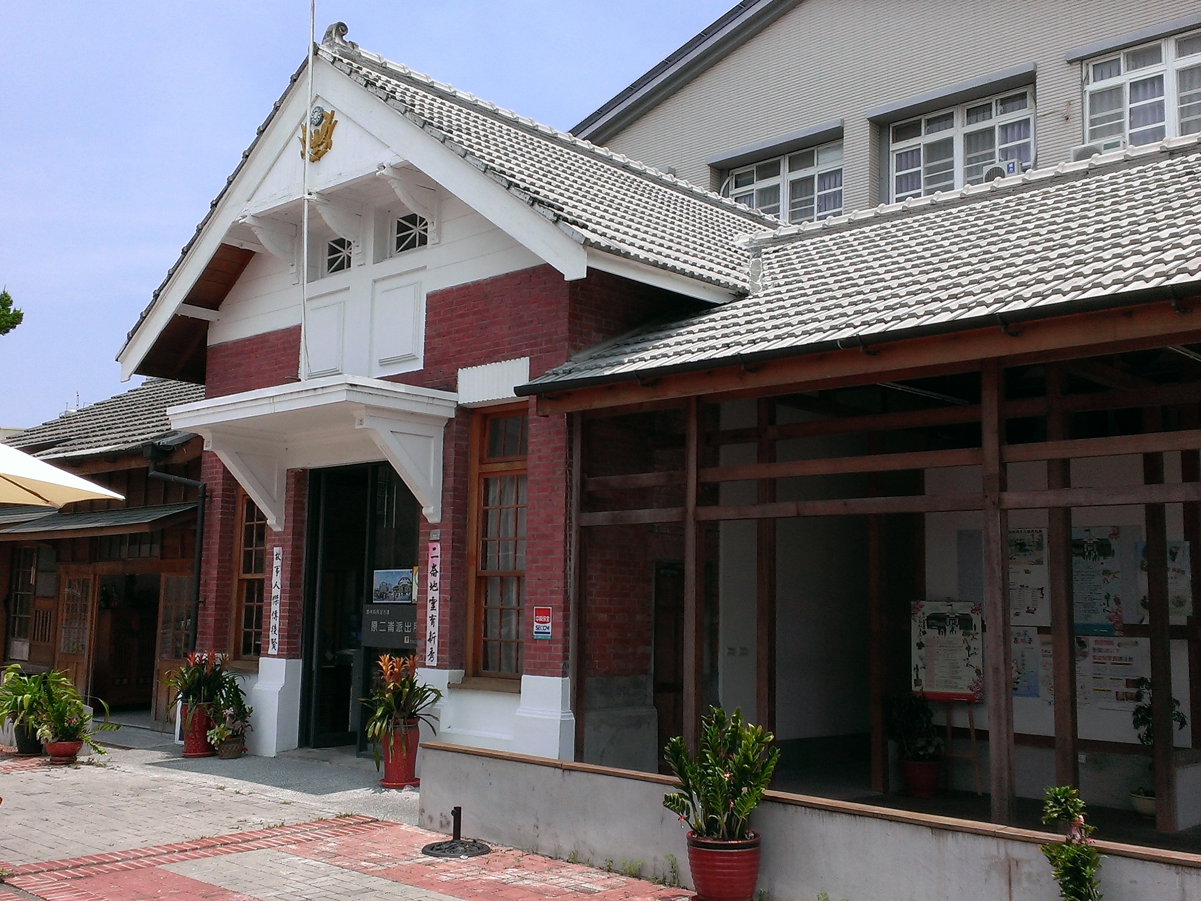 雲林縣歷史建築──原二崙派出所，現為二崙故事館